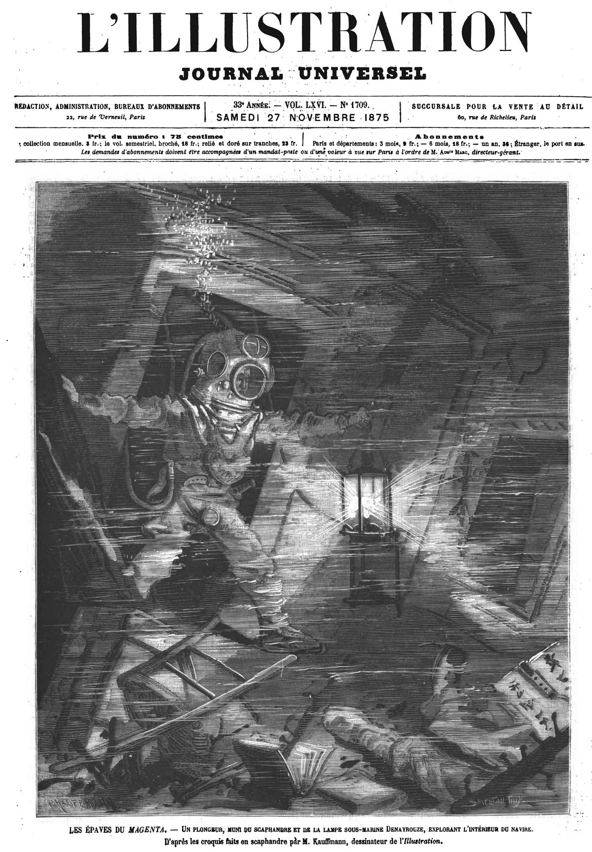 L'illustration de 1875- naufrage du Magenta à Toulon